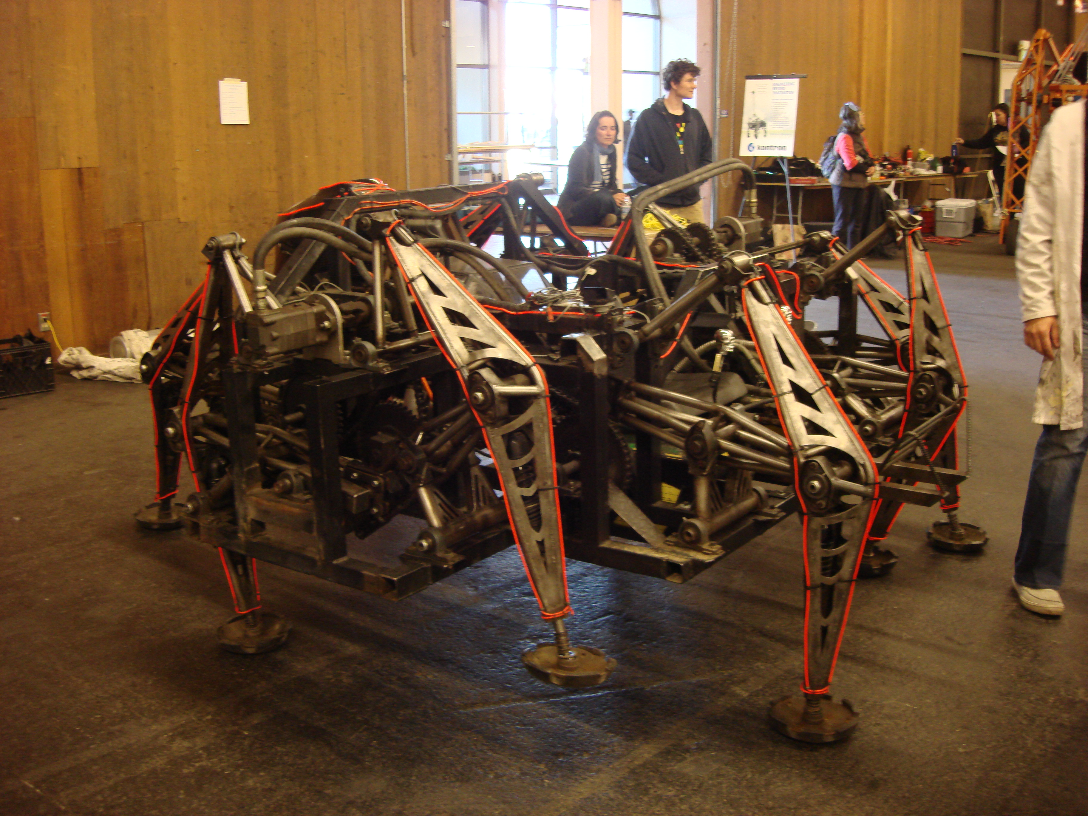 Mondo Spider - an eight legged vehicle